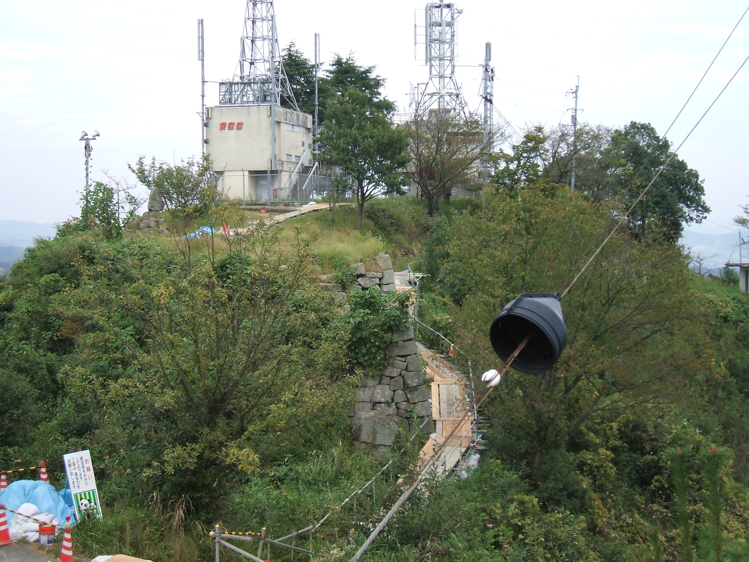 広島県福山市新市町にある相方城本郭の現状